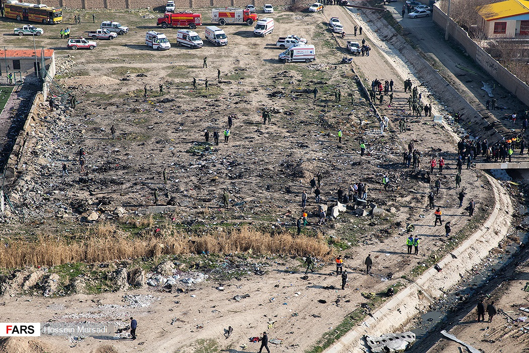 سقوط هواپیمای اوکراینی بوئینگ ۷۳۷–۸۰۰ بین شهرهای پرند و شهریار در استان تهران